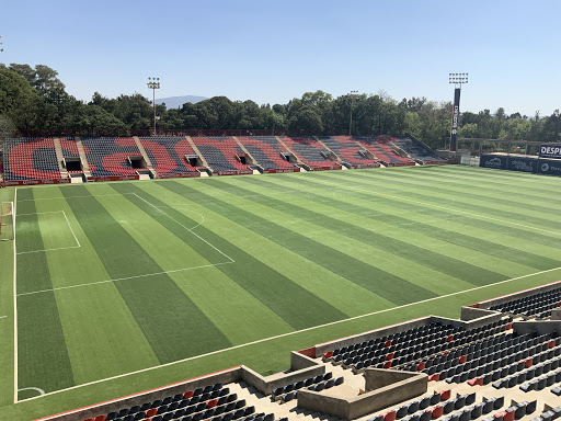 Remodelación actual